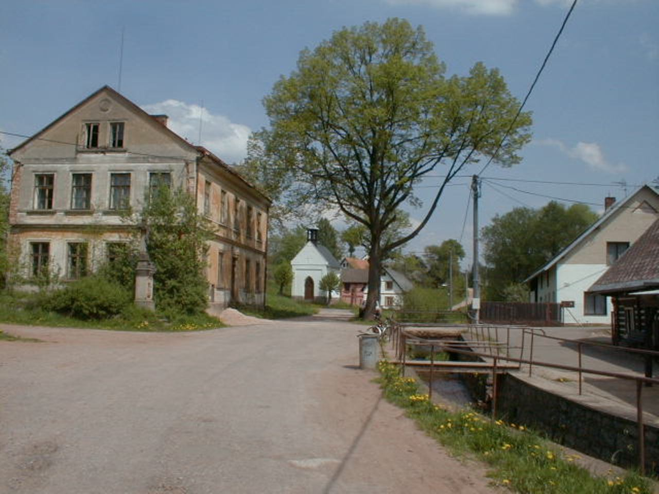 Vítězná - Záboří střed obce